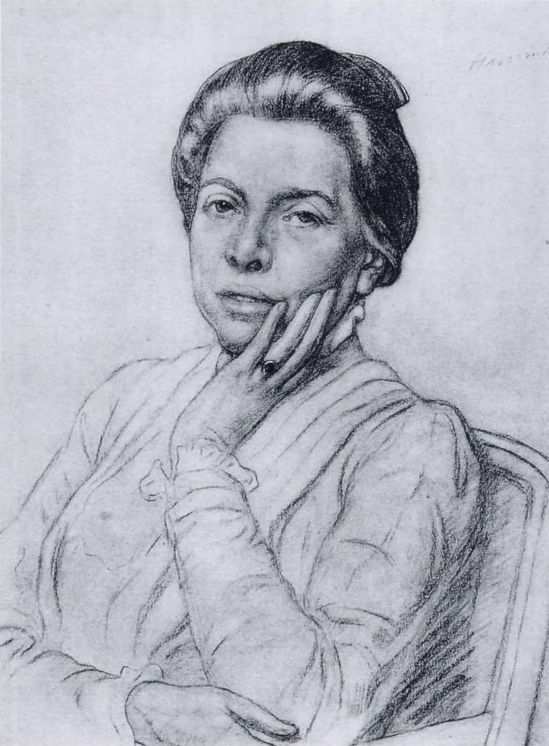 Portret van G.H. Marius door H.J. Haverman